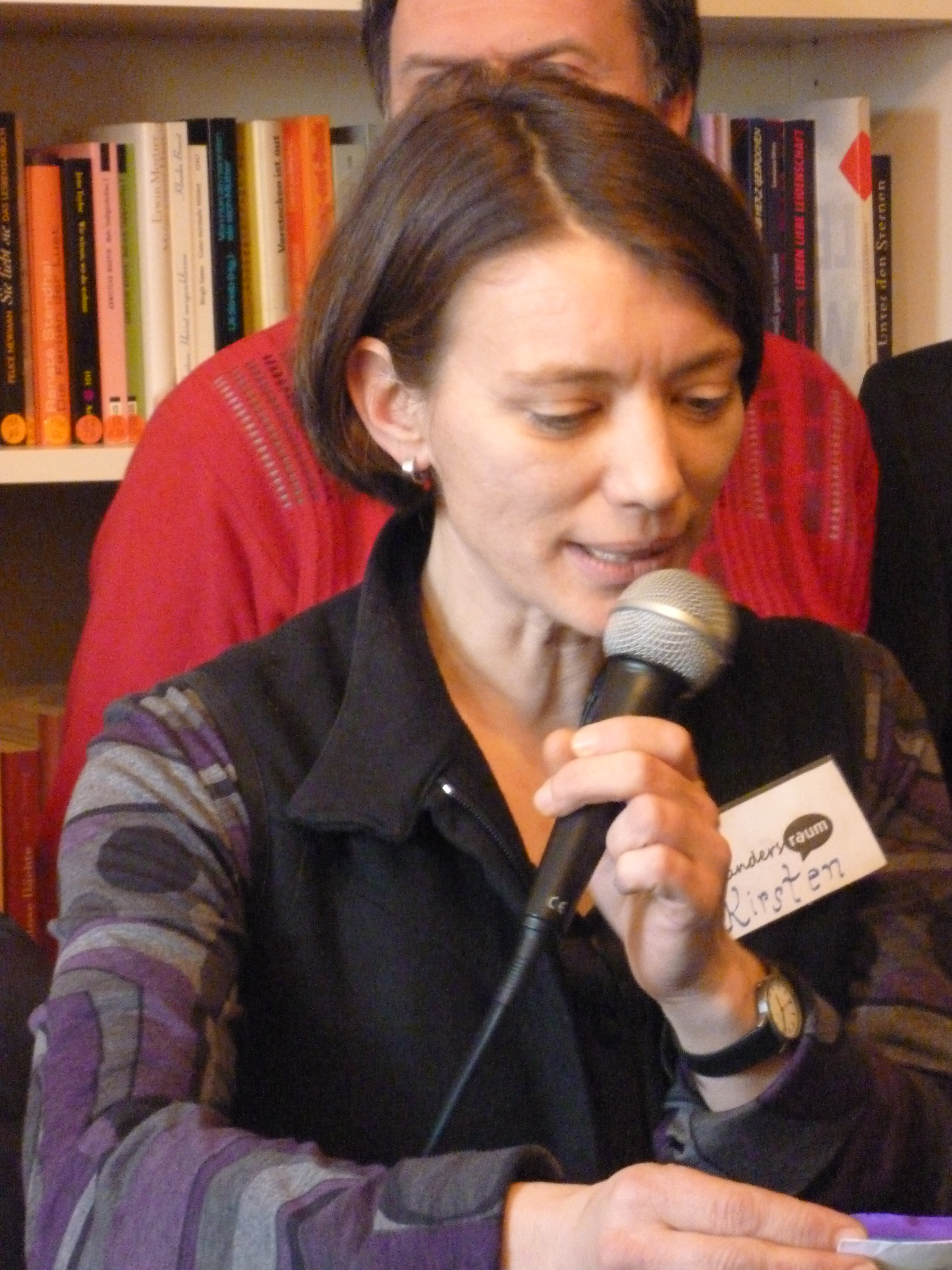 Eröffnungsfeierlichkeiten des Andersraum in der Asternstraße, Hannover-Nordstadt